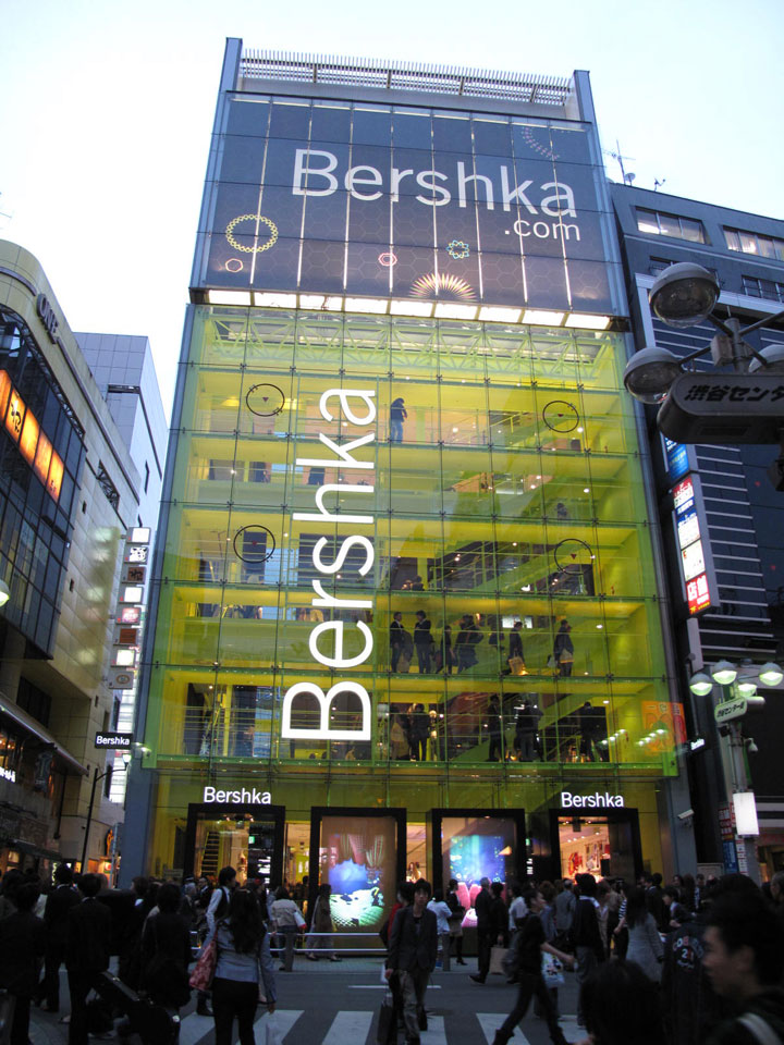 Tienda de Bershka en Shibuya, Tokyo